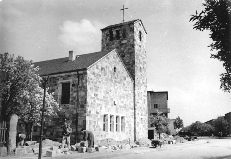 Illus-Biscan 12.5.51 Gr.-Jst. Eine neue katholische Kirche in Magdeburg. Aus den Abbruchsteinen einer durch Bomben anglo-amerikanischer Flieger zerstörten deutsch-reformierten Kirche wurde in Magdeburg-Cracau eine neue katholische Kirche, die St.Andreas-Kirche, errichtet. Die neue Kirche, die bereits in Benützung genommen wurde, ist in einem einfachen modernen Baustil errichtet, hat ein Haupt- und ein Nebenschiff und etwa 300 Plätze. Mit den anderen inzwischen wieder instandgesetzten Kirchen stehen dem katholischen Teil der Bevölkerung Magdeburgs nunmehr acht Kirchen zur Verfügung. UBz, Die neue St.Andreas-Kirche in Magdeburg.